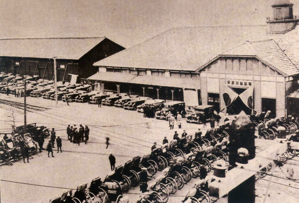 1931年頃の長崎港出島岸壁の連絡船待合所と長崎港駅。